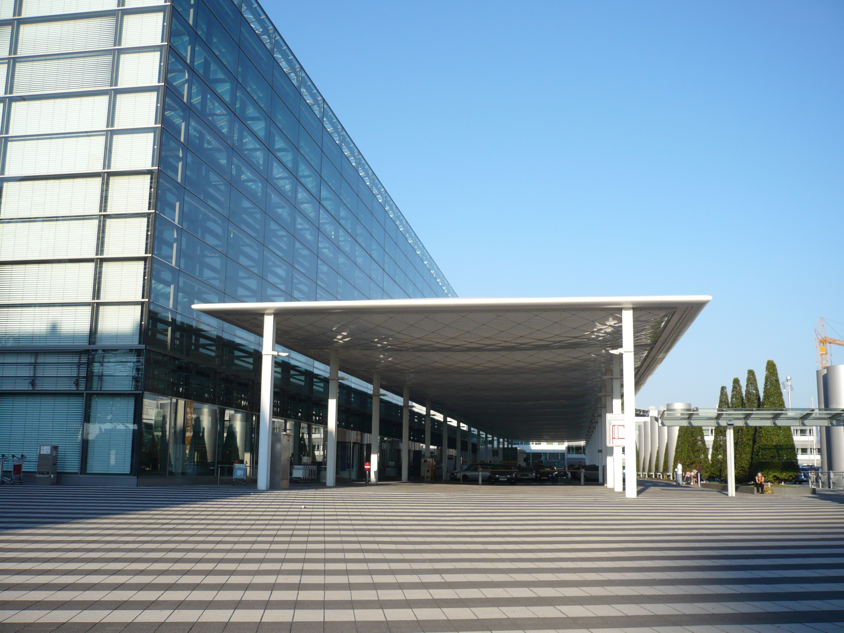 Vorfahrt am Terminal 2 des Flughafen Münchens